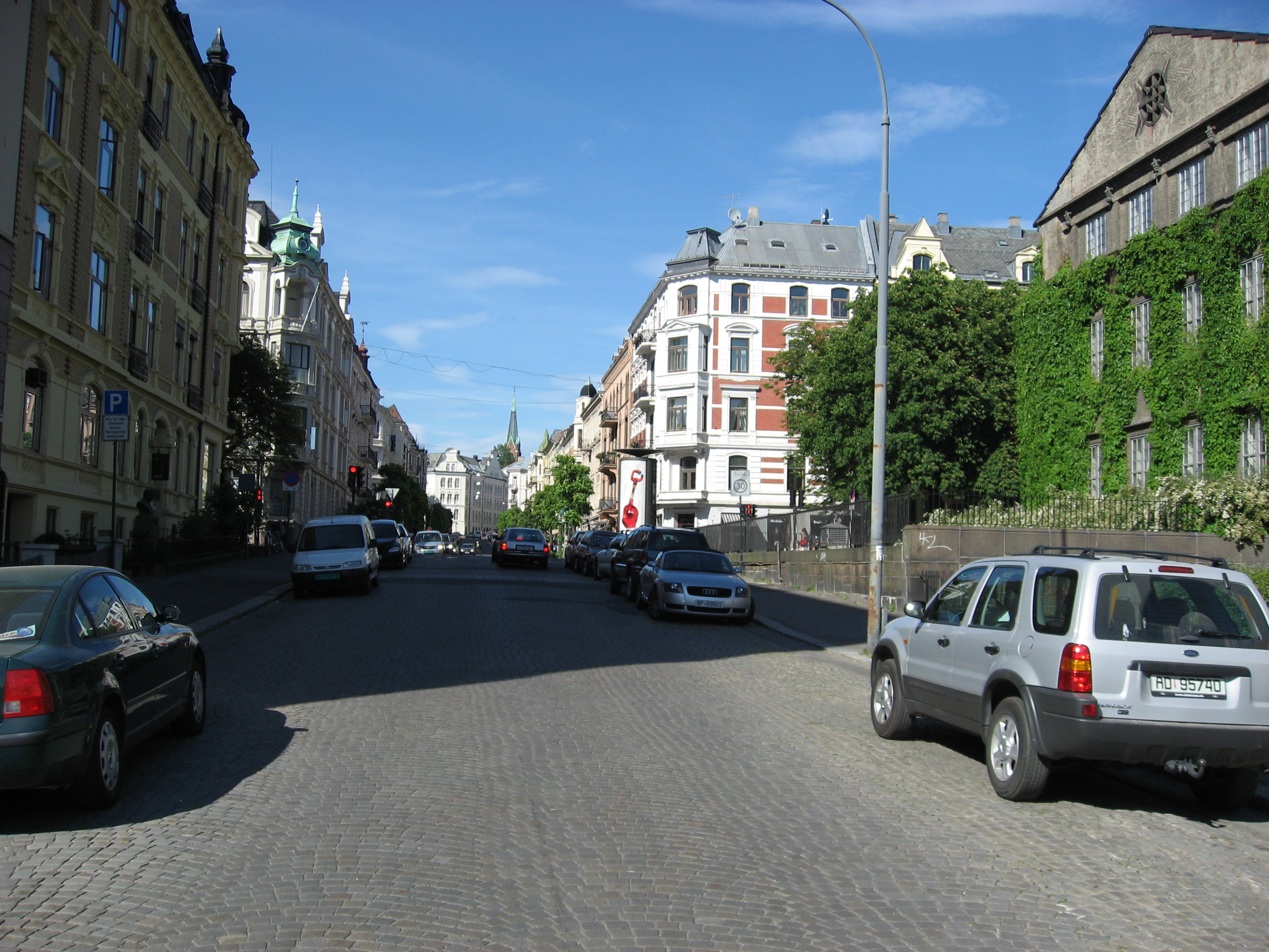 Niels Juels gate, Street in Oslo, Norway